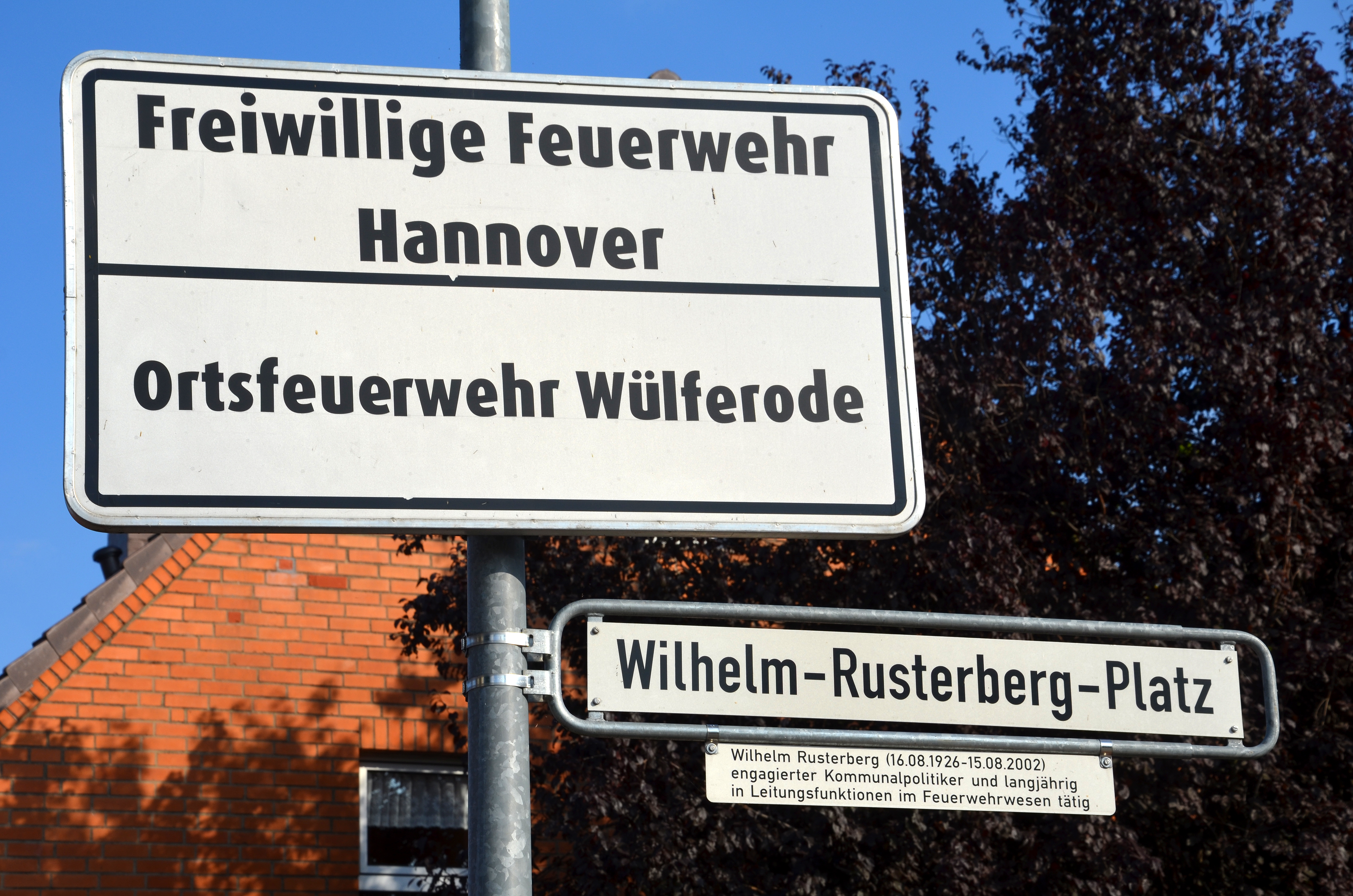 Straßenschild am Wilhelm-Rusterberg-Platz mit der Legendentafel „Wilhelm Rusterberg (16.08.1926-15.08.2002) / engagierter Kommunalpolitiker und langjährig in Leitungsfunktionen im Feuerwehrwesen tätig“ gesehen vor der Freiwilligen Feuerwehr Hannover, Ortsfeuerwehr Wülferode an der Kirchbichler Straße in Wülferode ...